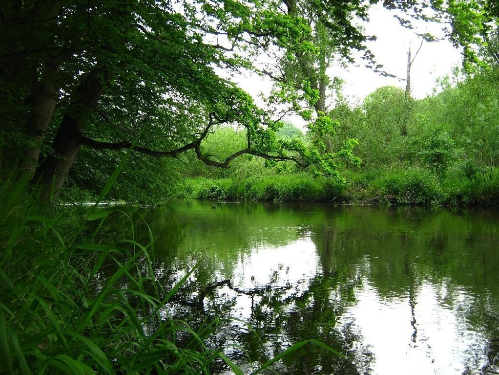 die Rega, ein Fluss in Hinterpommern, Woiwodschaft Westpommern (Nordwestpolen).